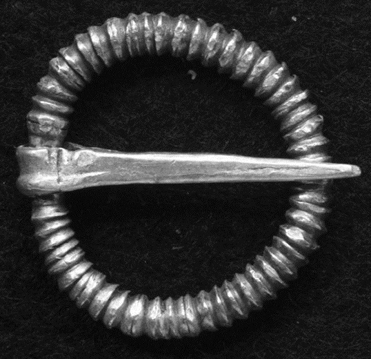 Skjortering i sølv, jordfunn fra Dæli i Ringsaker, Hedmark og datert til 1200-årene. Foto Kulturhistorisk museum, Universitetet i Oslo.